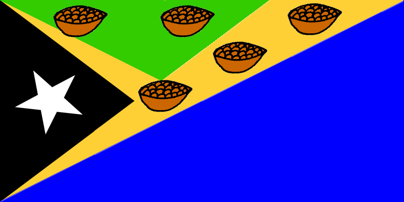 Bandeira do Cova Lima. Cova Lima significa „cinco cestos de nozes de betel“, representando os cinco reinos Kamenasa, Suai, Maucatar, Taroman e Fohoren. Estes reinos formaram uma união sob a suserania de Fohoren. Azul é o Mar de Timor, nas margens do qual fica Cova Lima, ouro as praias, verde a paisagem regada pelos rios.